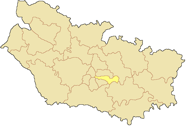 Canton d'Amiens-4 dans le département de la Somme